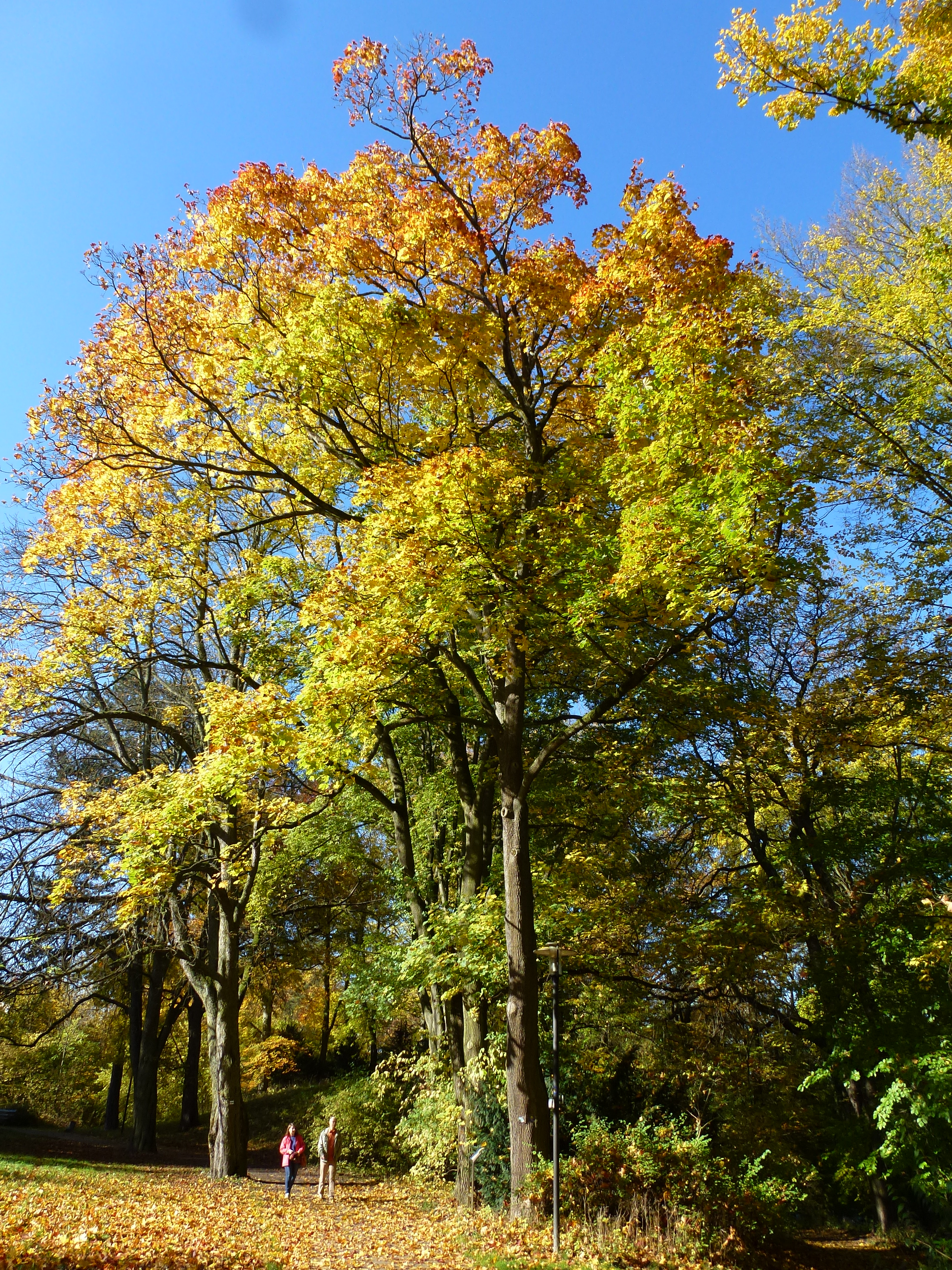 Dies ist einer der vielen Spazierwege durch das Landschaftsschutzgebiet Theresienstein in der Stadt Hof. Viele alte Laubbäume bilden einen Parkwald.